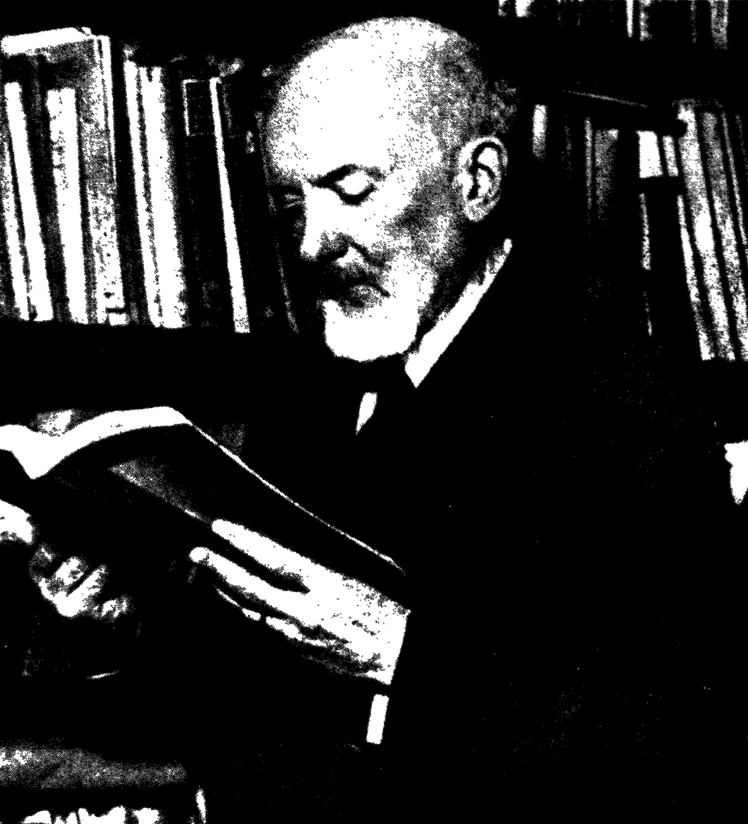 Historien de la Révolution française